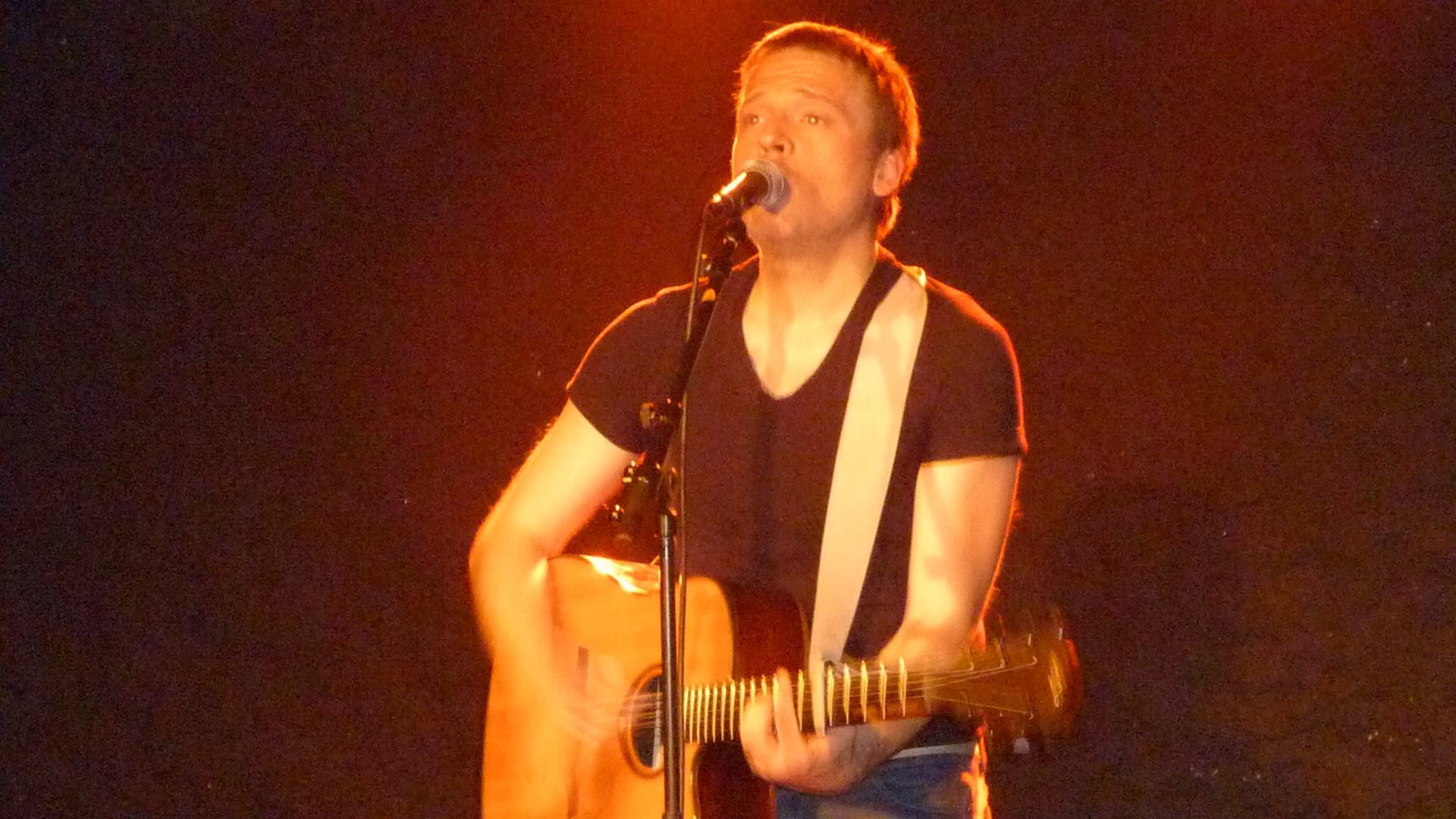 Elias en concert au Sentier des Halles le 24 mai 2014